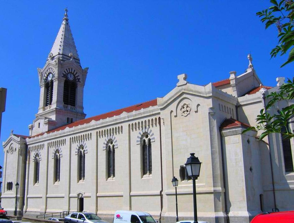 L'église Saint-Joseph à Saint-Héand.